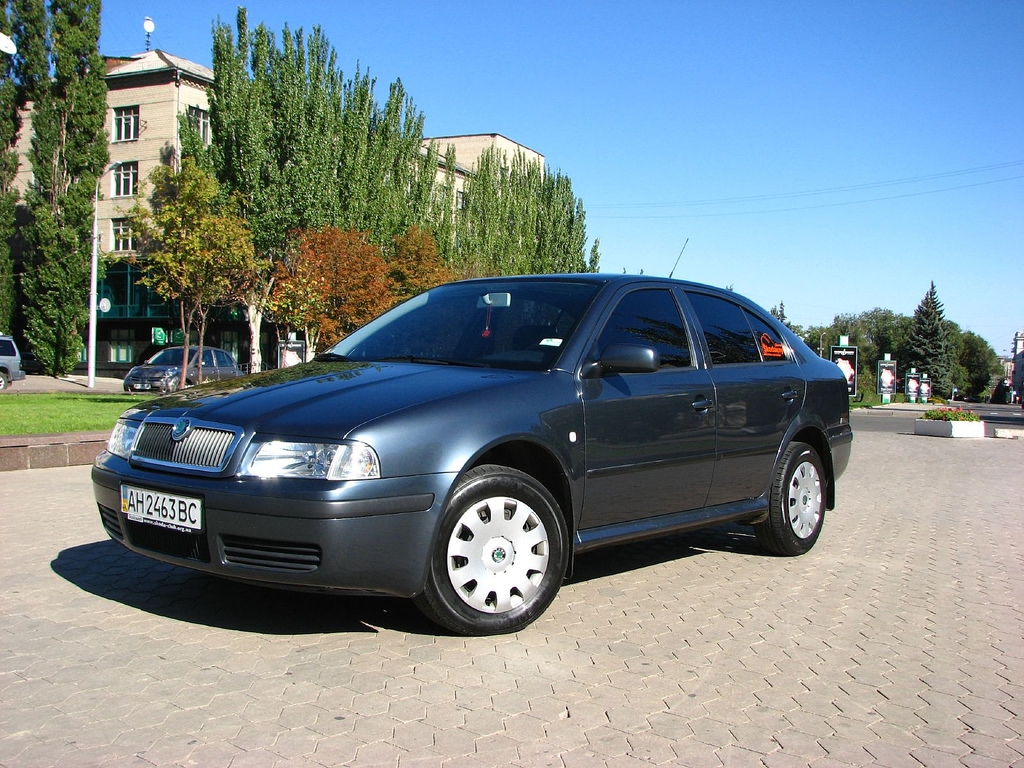 Škoda Octavia ISold